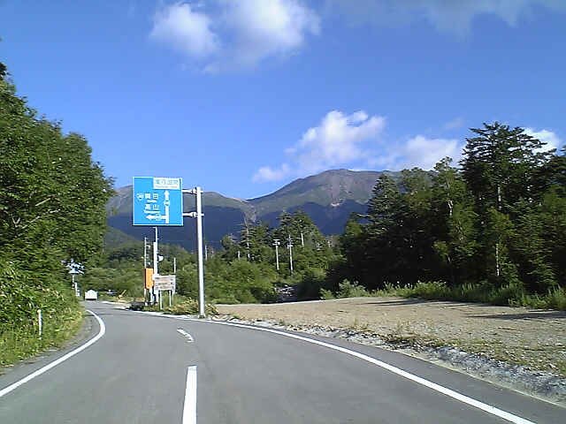 岐阜県道441号落合飛騨小坂停車場線